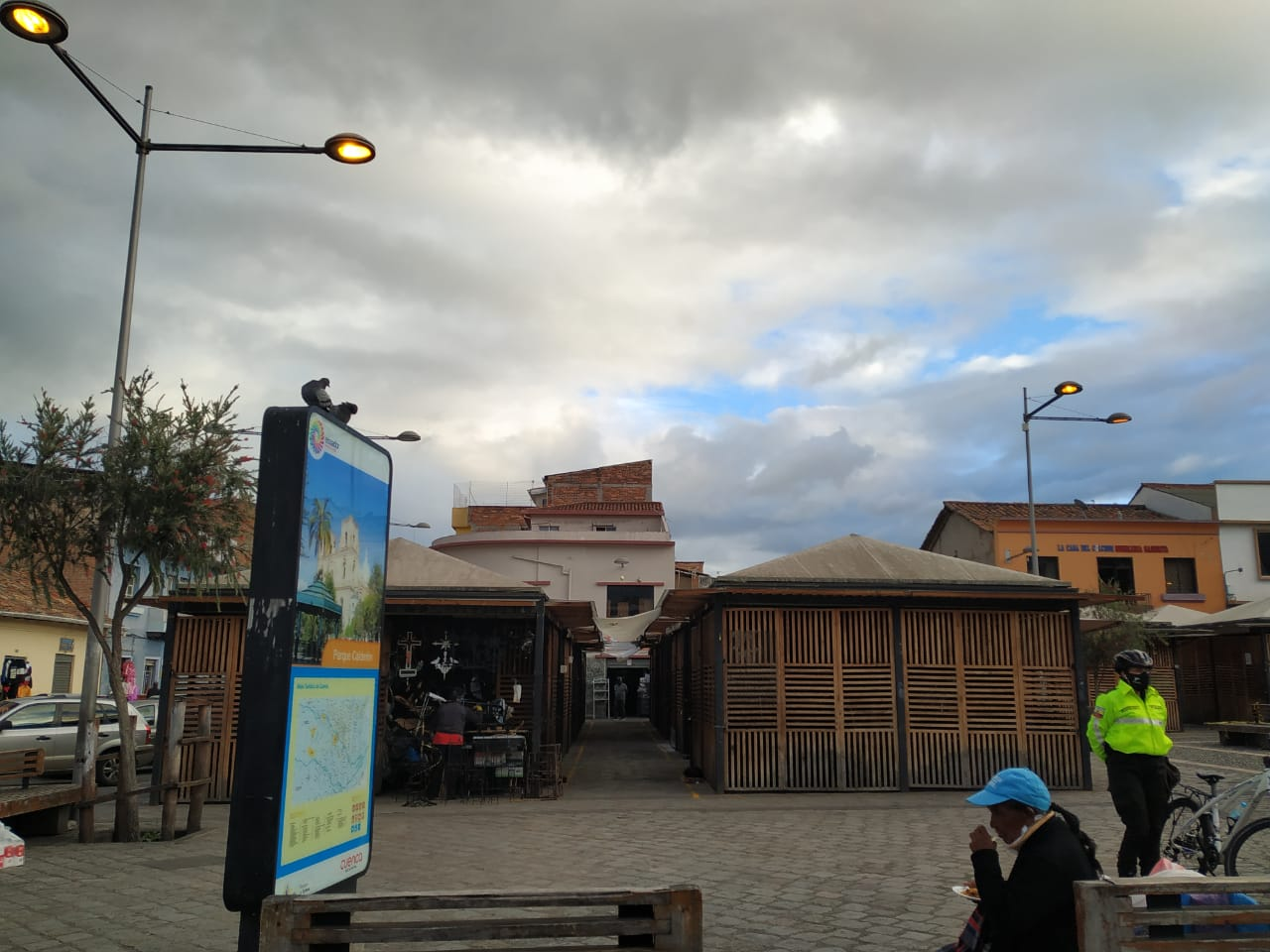 Vista frontal de la plaza Rotary